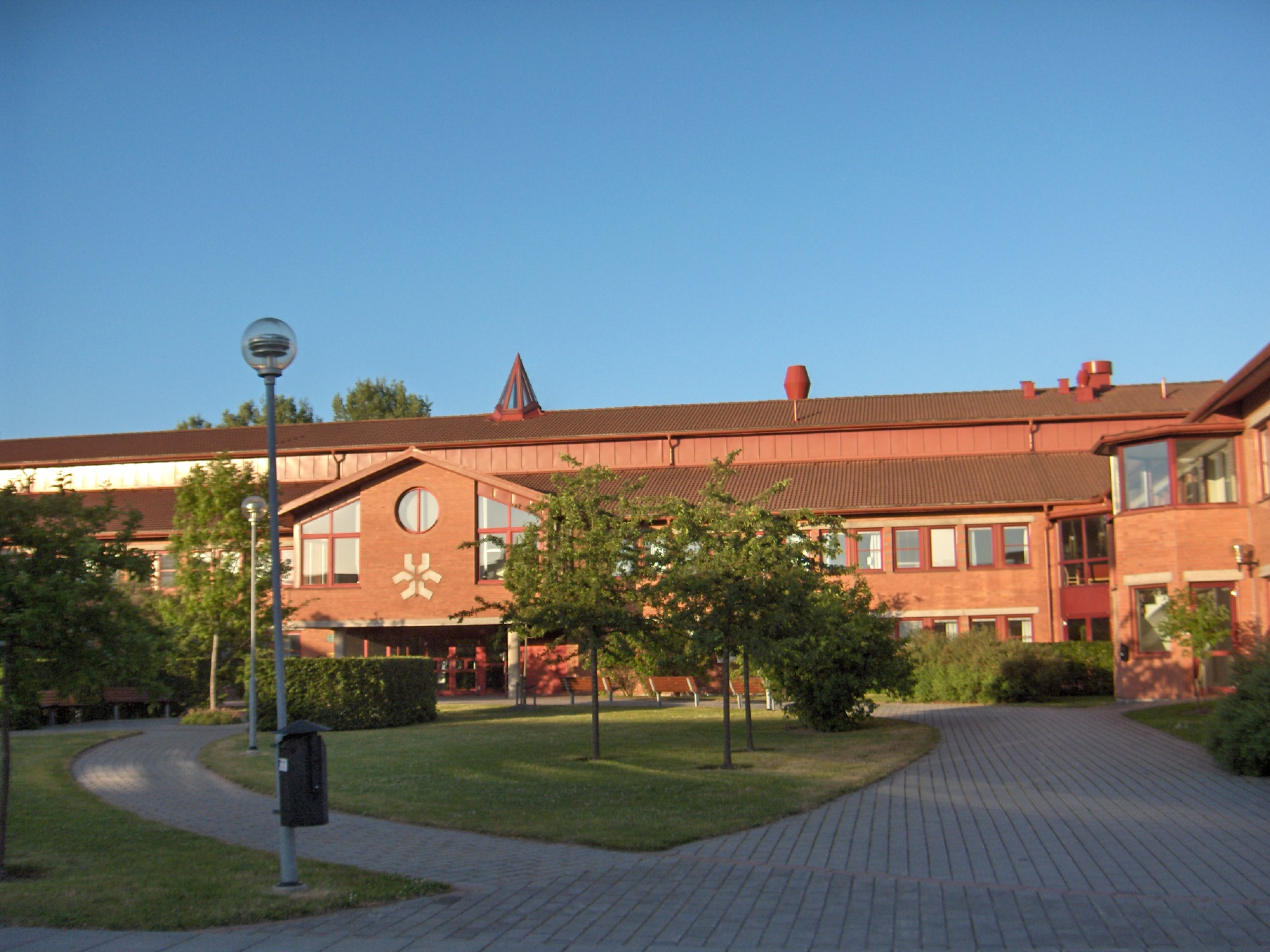 林雪平大学 Origo-行政楼